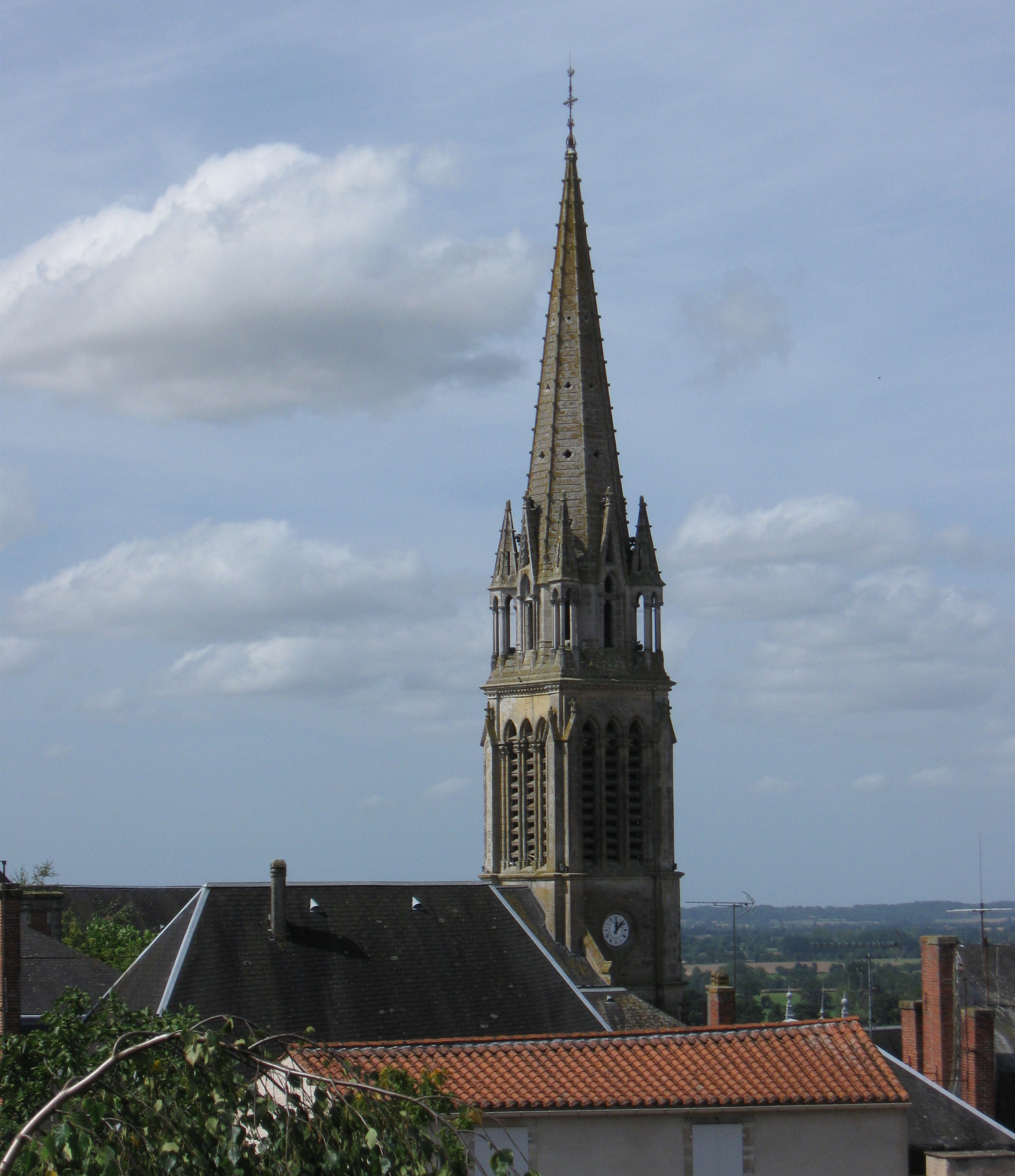 Église Saint-Jean-Baptiste de La Châtaigneraie. (Vendée, région Pays de la Loire).